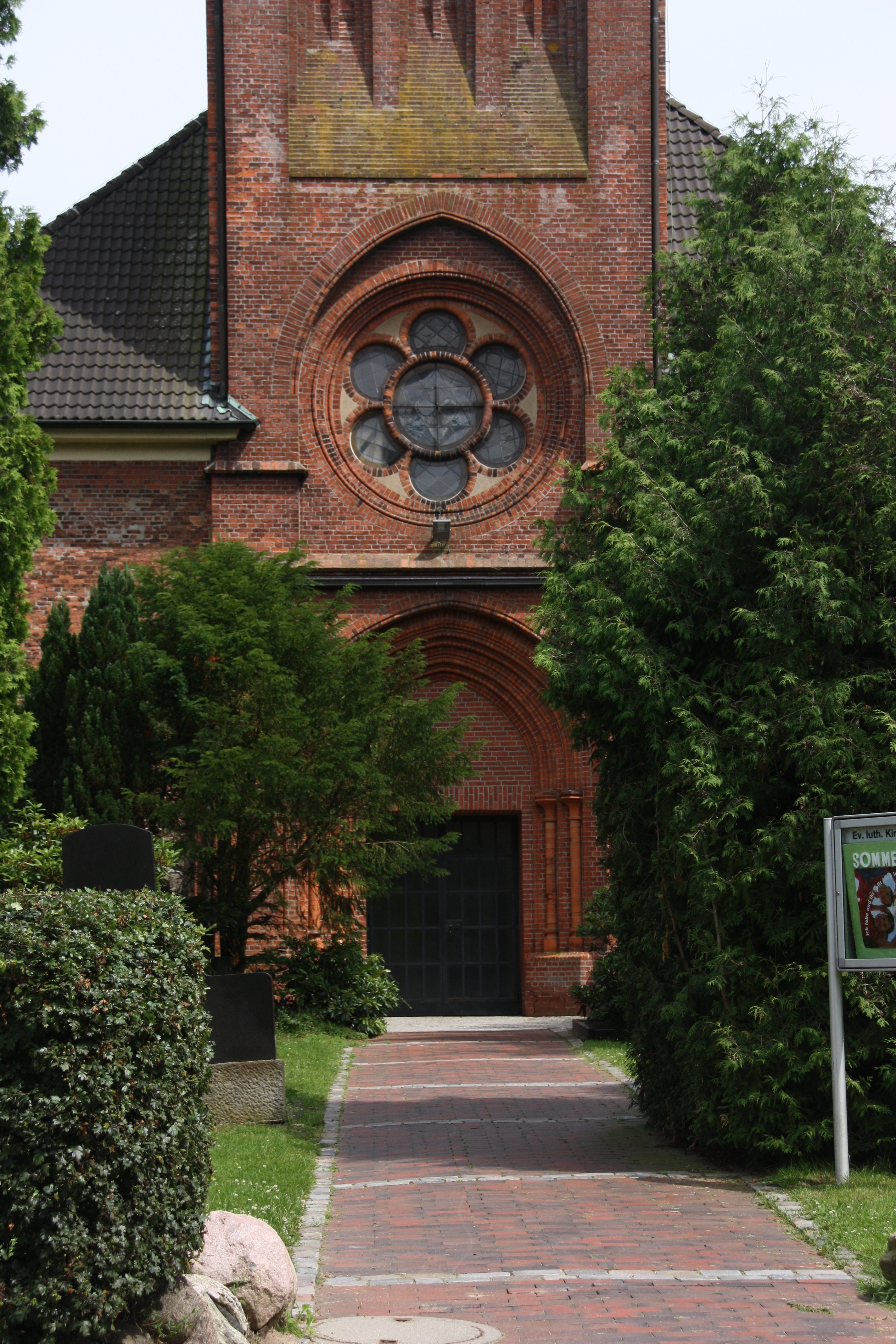 Siek (Stormarn), Friedenskirche, Eingang und Fensterrosette